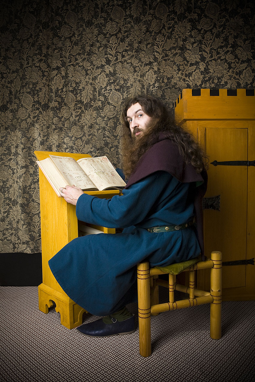 Ladislav Sluka zvaný Kocour se svým nábytkem